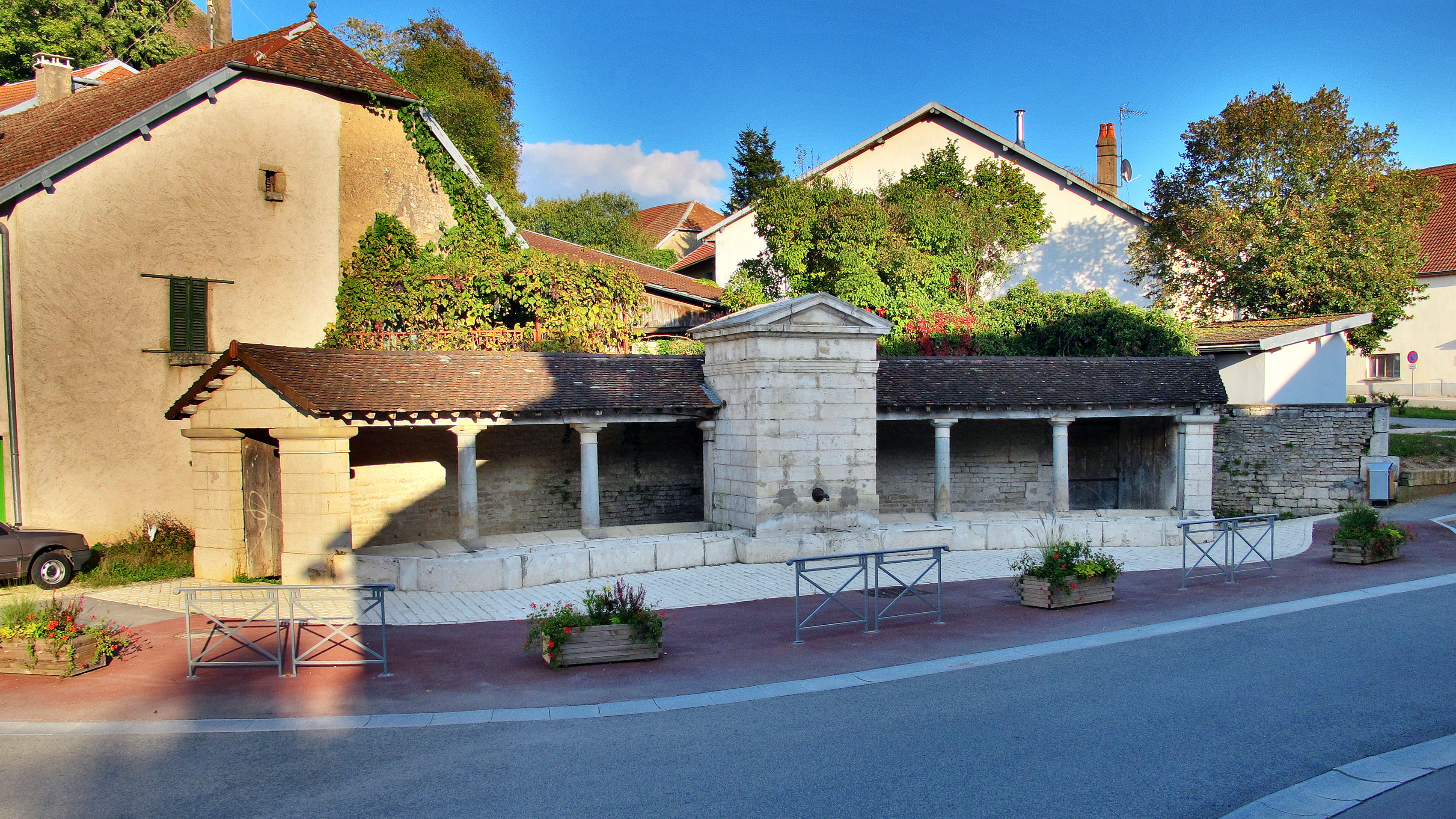 Fontaine de Boult (Haute-Saône, France)